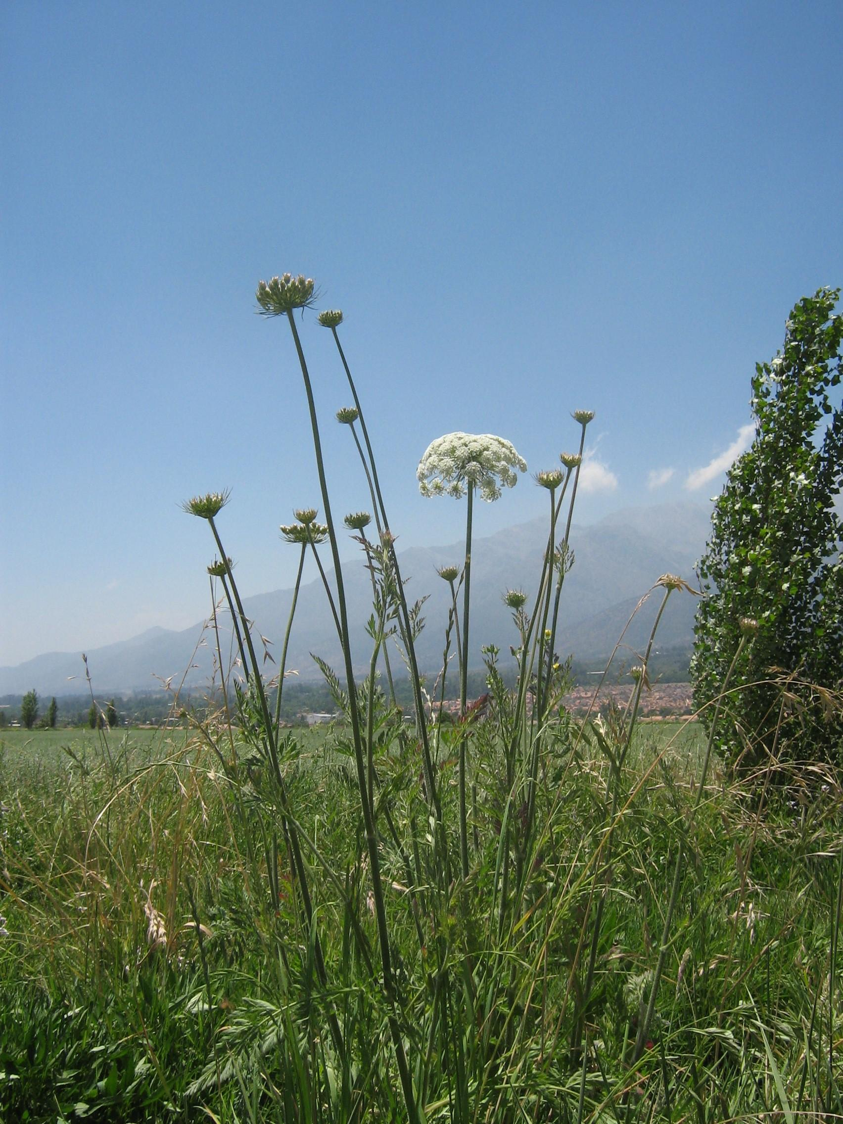 Daucus visnaga (La planta de la foto de la izquierda se trata efectivamente de Ammis visnaga (L.)Lam. (Daucus bisnaga),pero no así la aque aparece en la otra foto,que se trata seguramente de otra especie cercana que se llama Ammi majus L.de folíolos oblongo -lanceolados,aserrados en lugar de los segmentos lineares en que se dividen las hojas de A. bisnaga.)